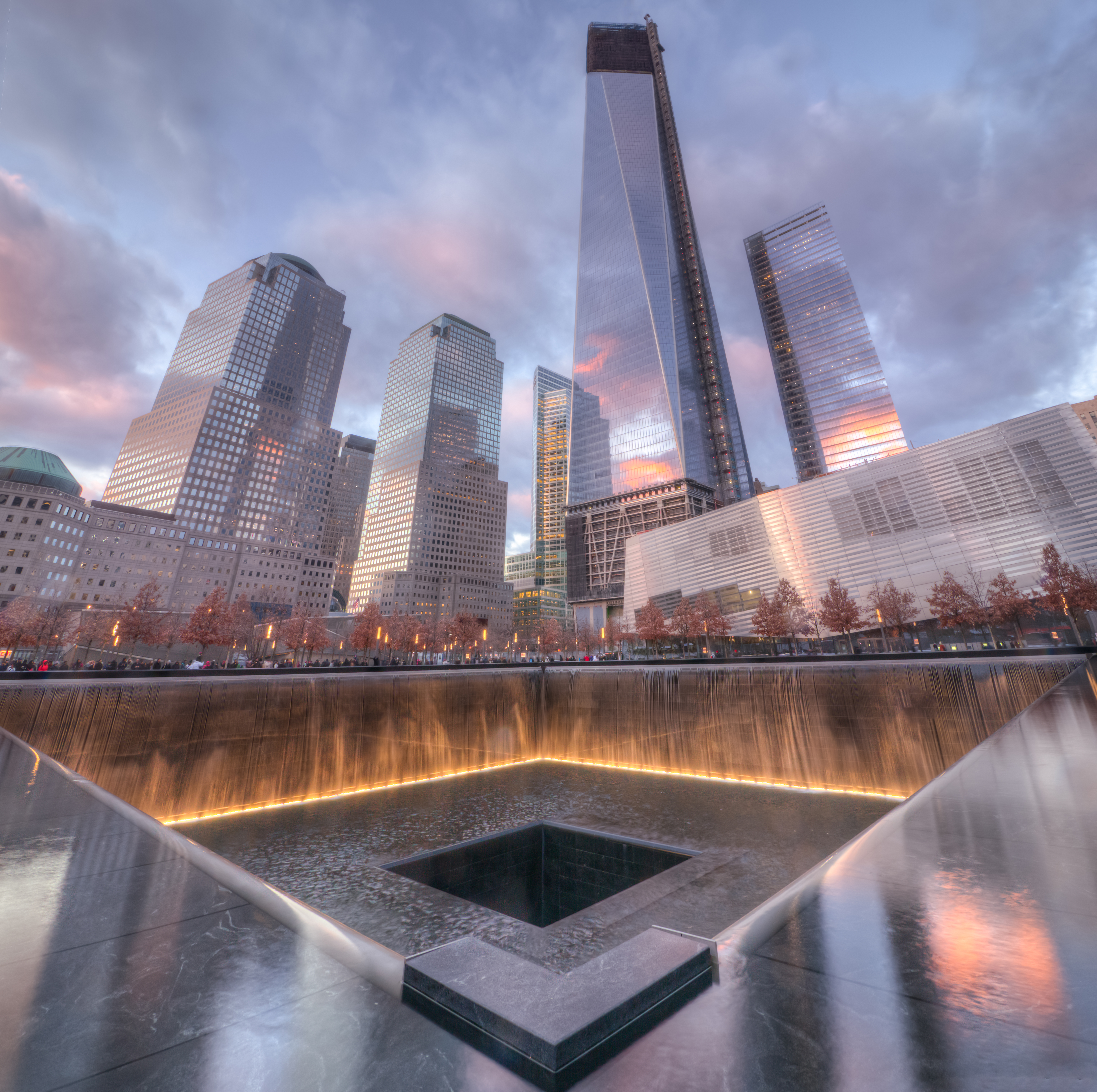 Sunset at 9-11 memorial